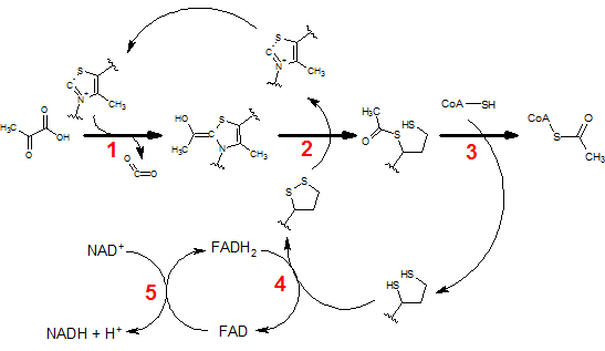 Trolig reaktionsmekanism för pPDHC baserat på humant PHDC.